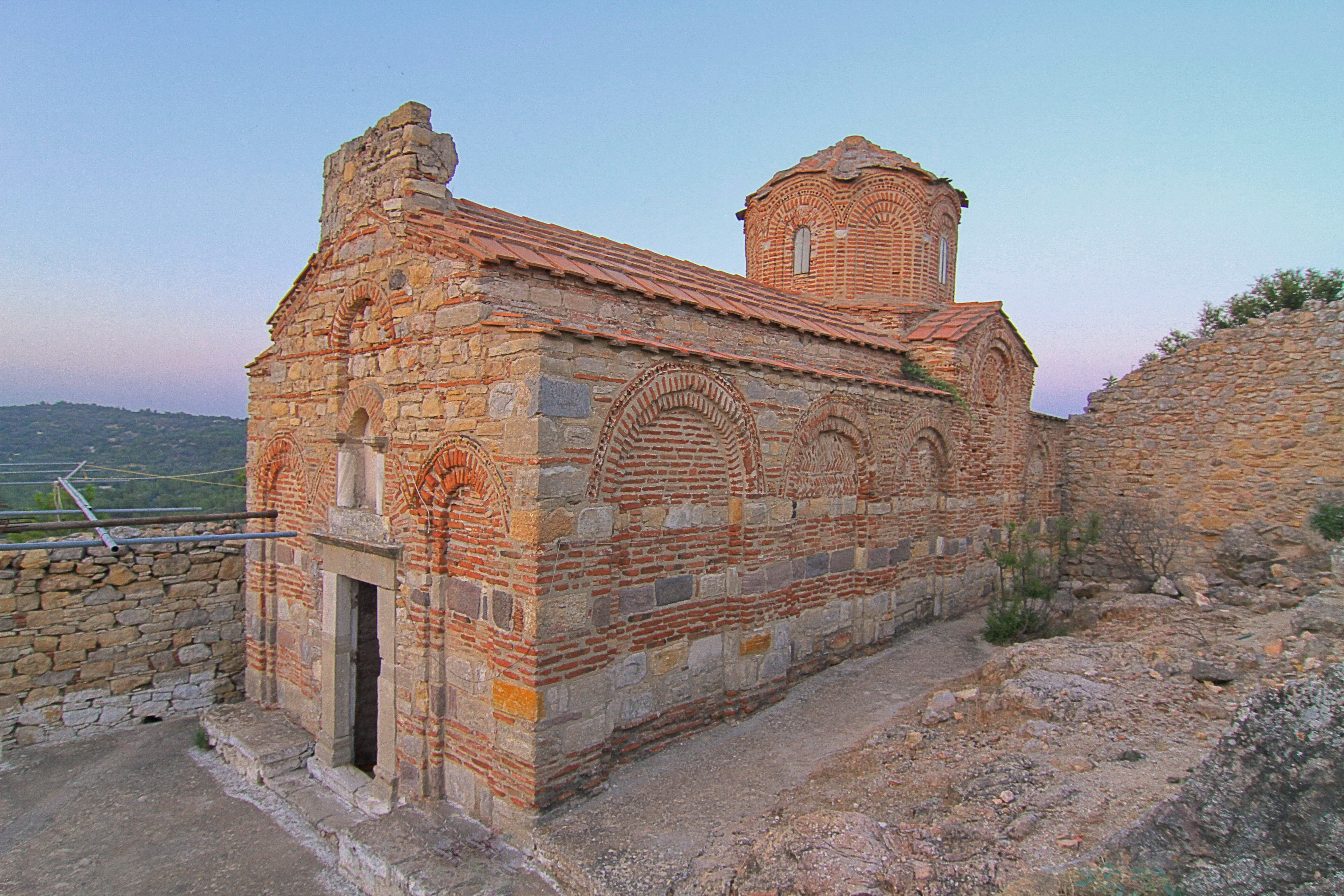 Ναός Παναγίας Σικελιάς στην Έξω Διδύμα«Ναός Παναγίας Σικελιάς στην Έξω Διδύμα»